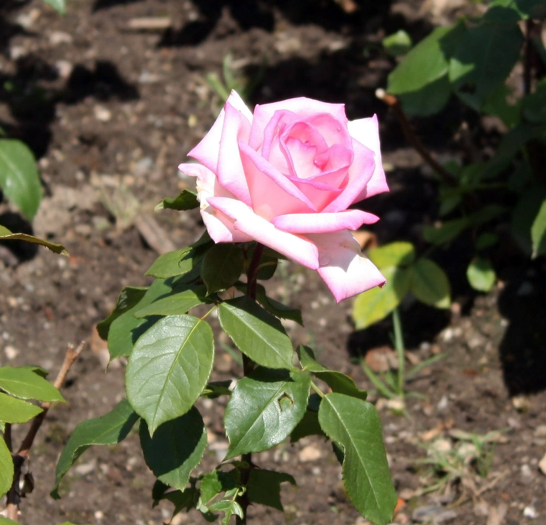 Edel-Rose Wimi (Willy Millowitsch). Rosenzüchter: Rosen Tantau, 1982.